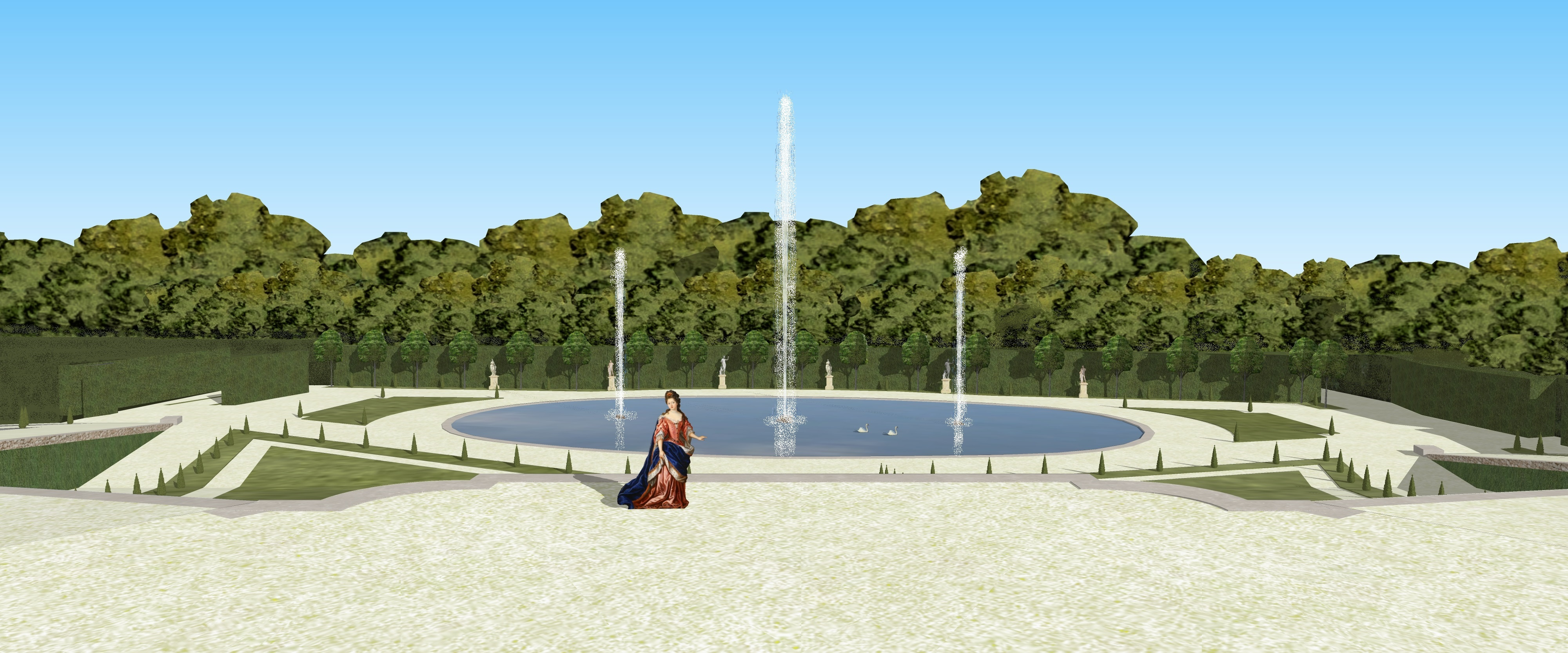 Restitution du parterre de l'Ovale, jardins bas de Meudon.